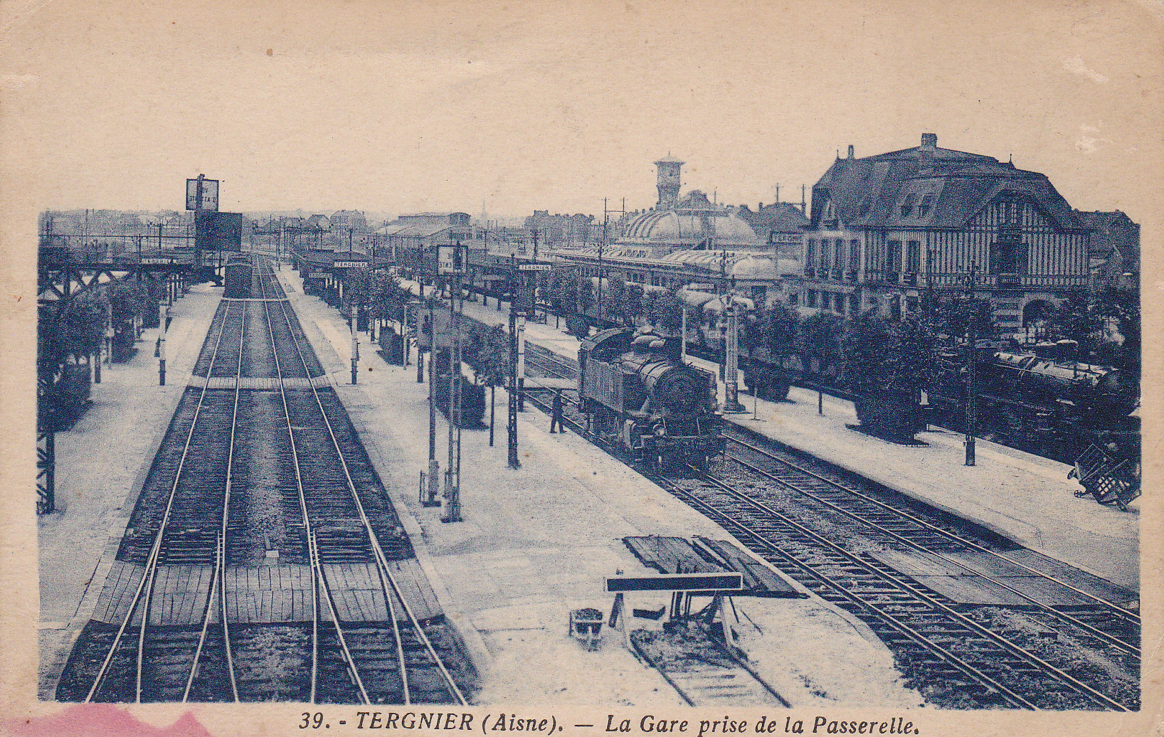 Carte postale ancienne de la gare de Tergnier